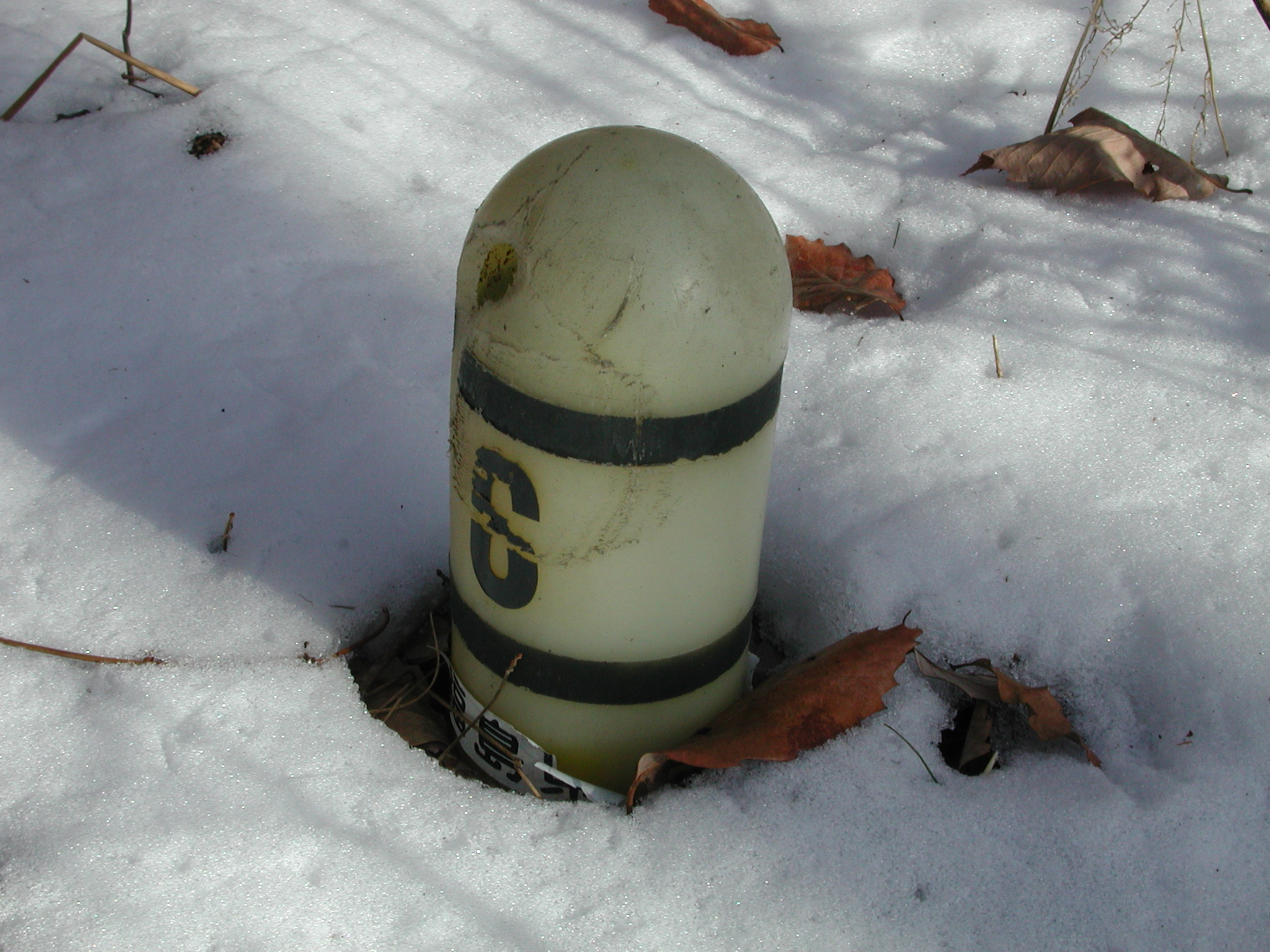 kiroposuto